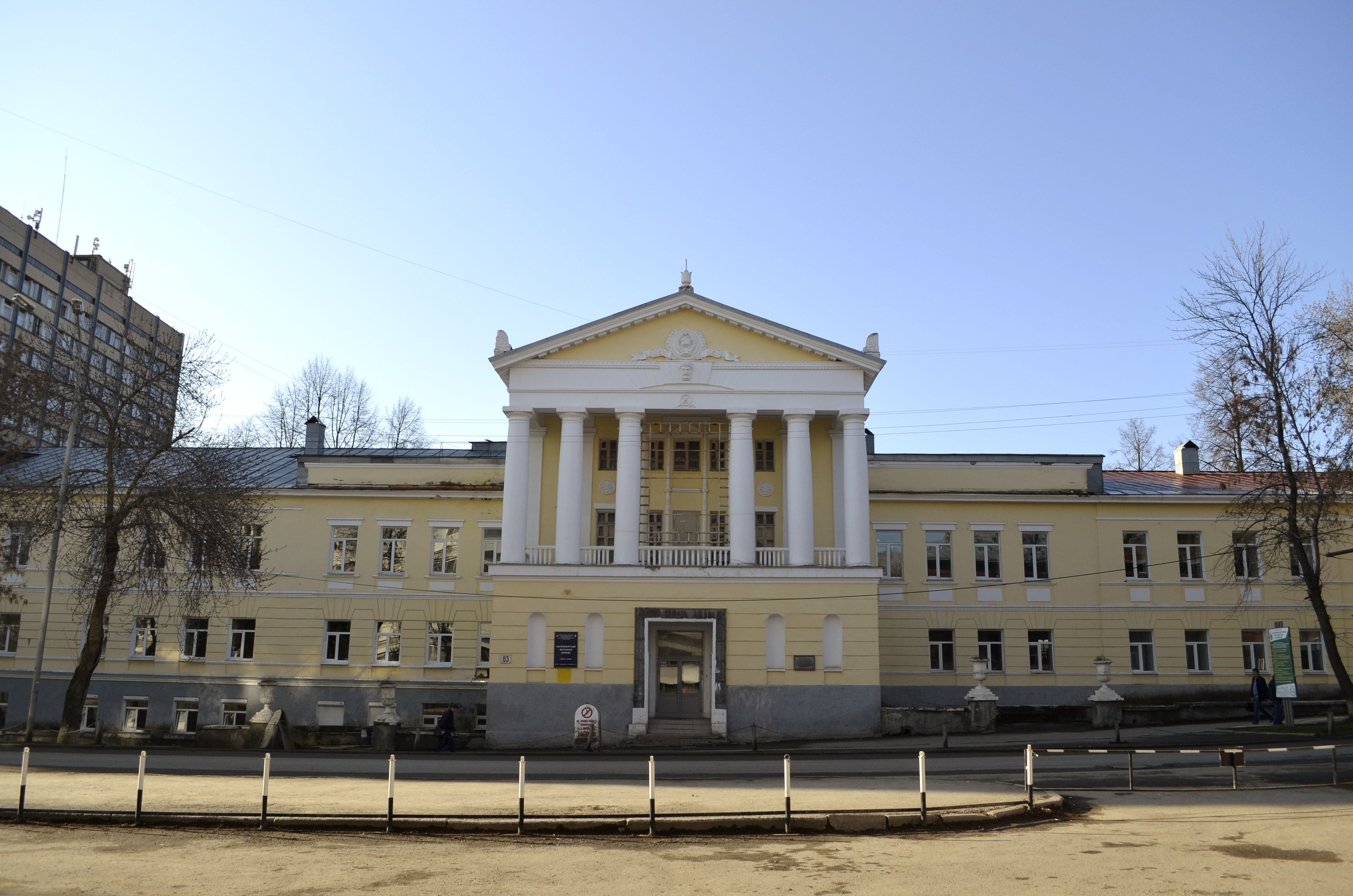 Здание епархиального училища, где в 1903 - 1914 гг. преподавал П.П. Бажов: улица Декабристов, 83, Екатеринбург, Свердловская область